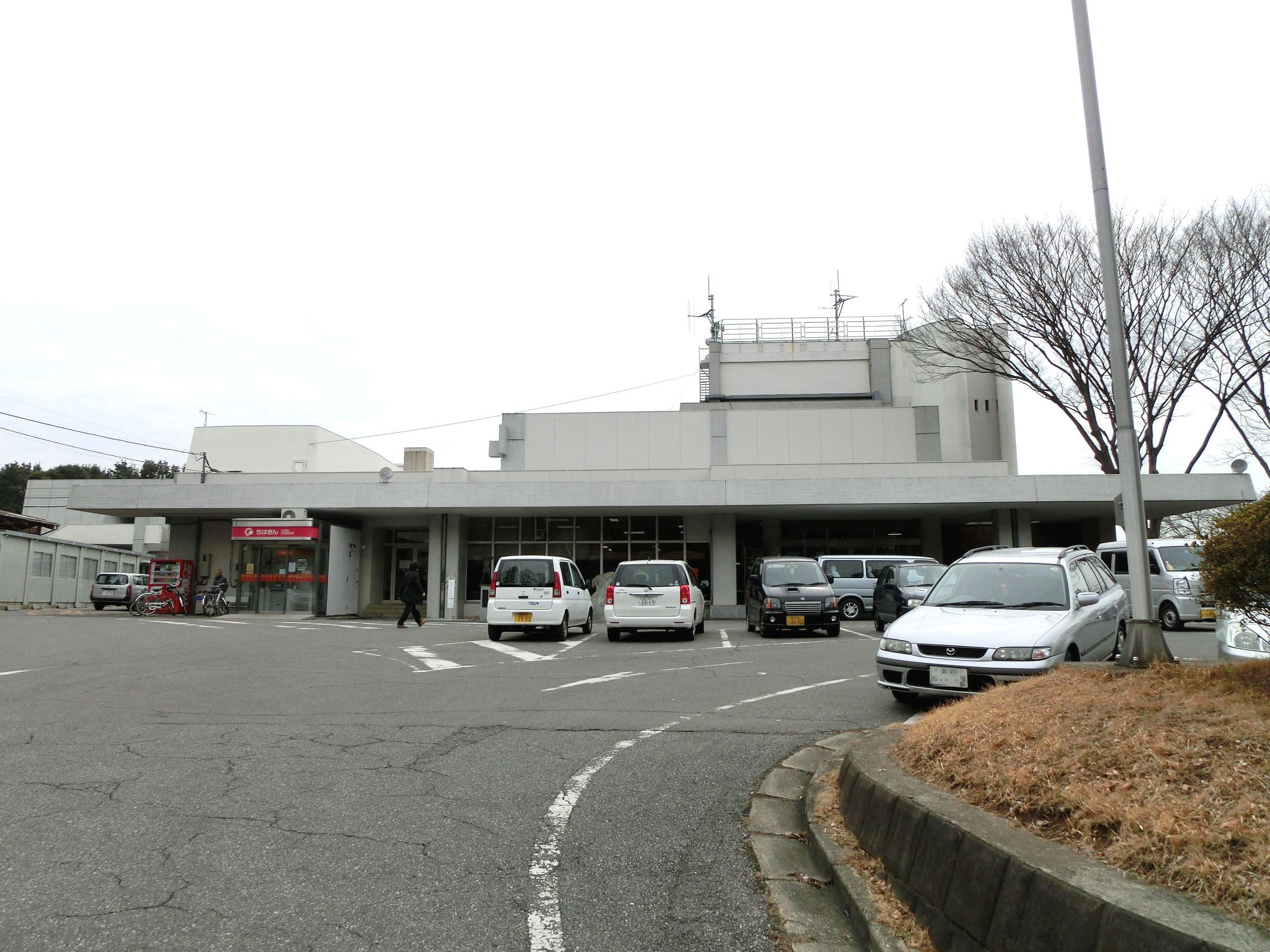 我孫子市役所